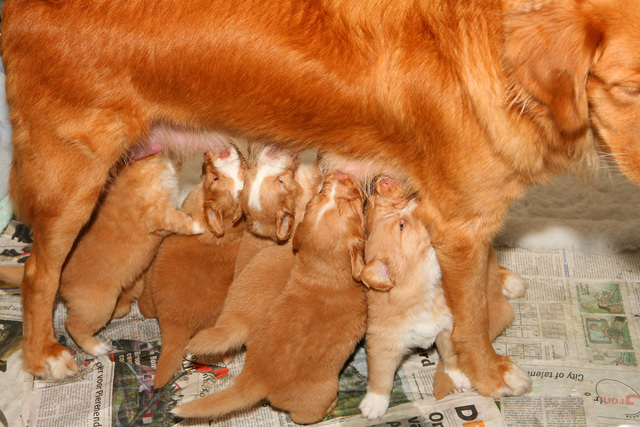 Nova Scotia duck tolling retriever – Nestje pups